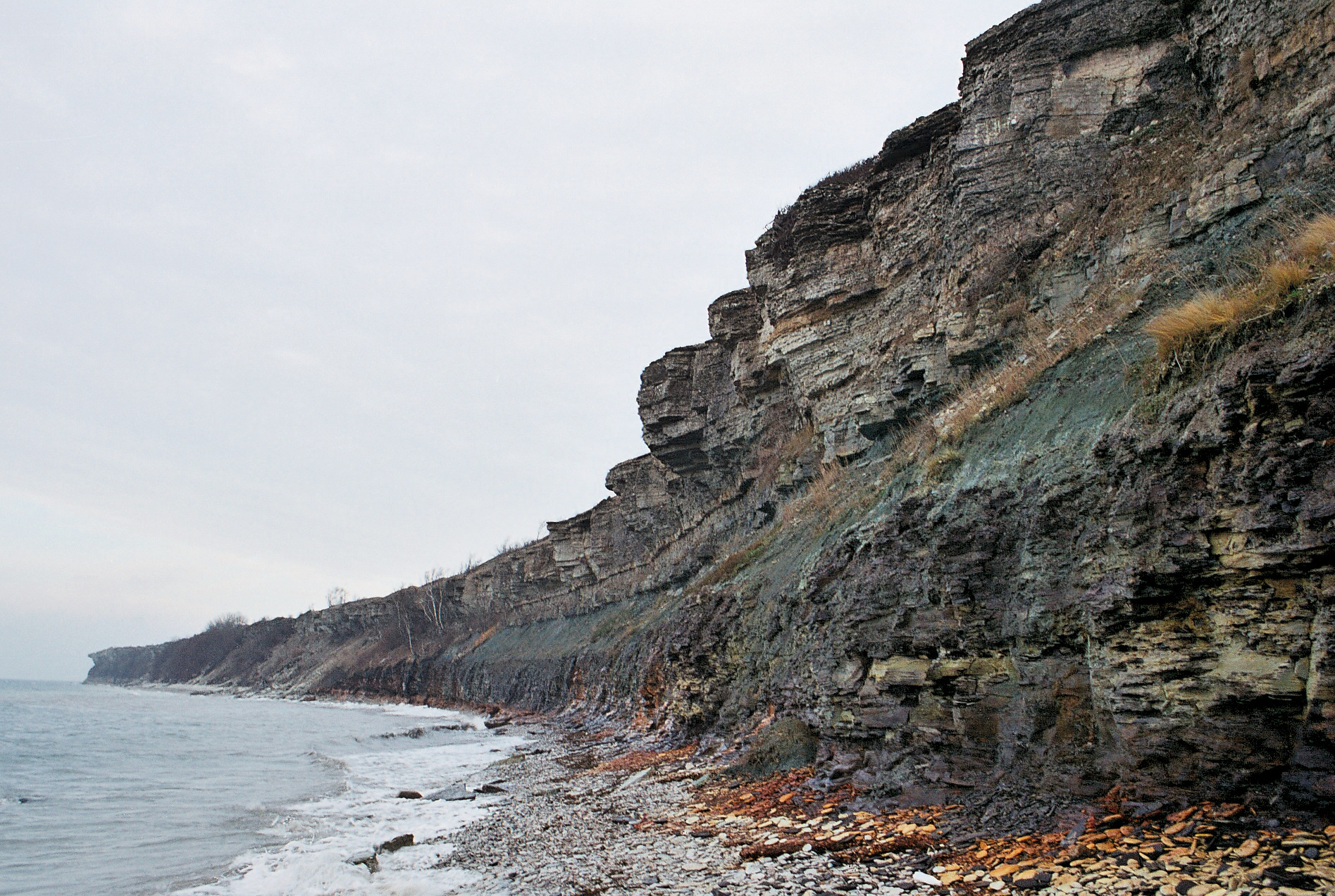 Põhja-Eesti paekallas Paldiski lähedal 2006